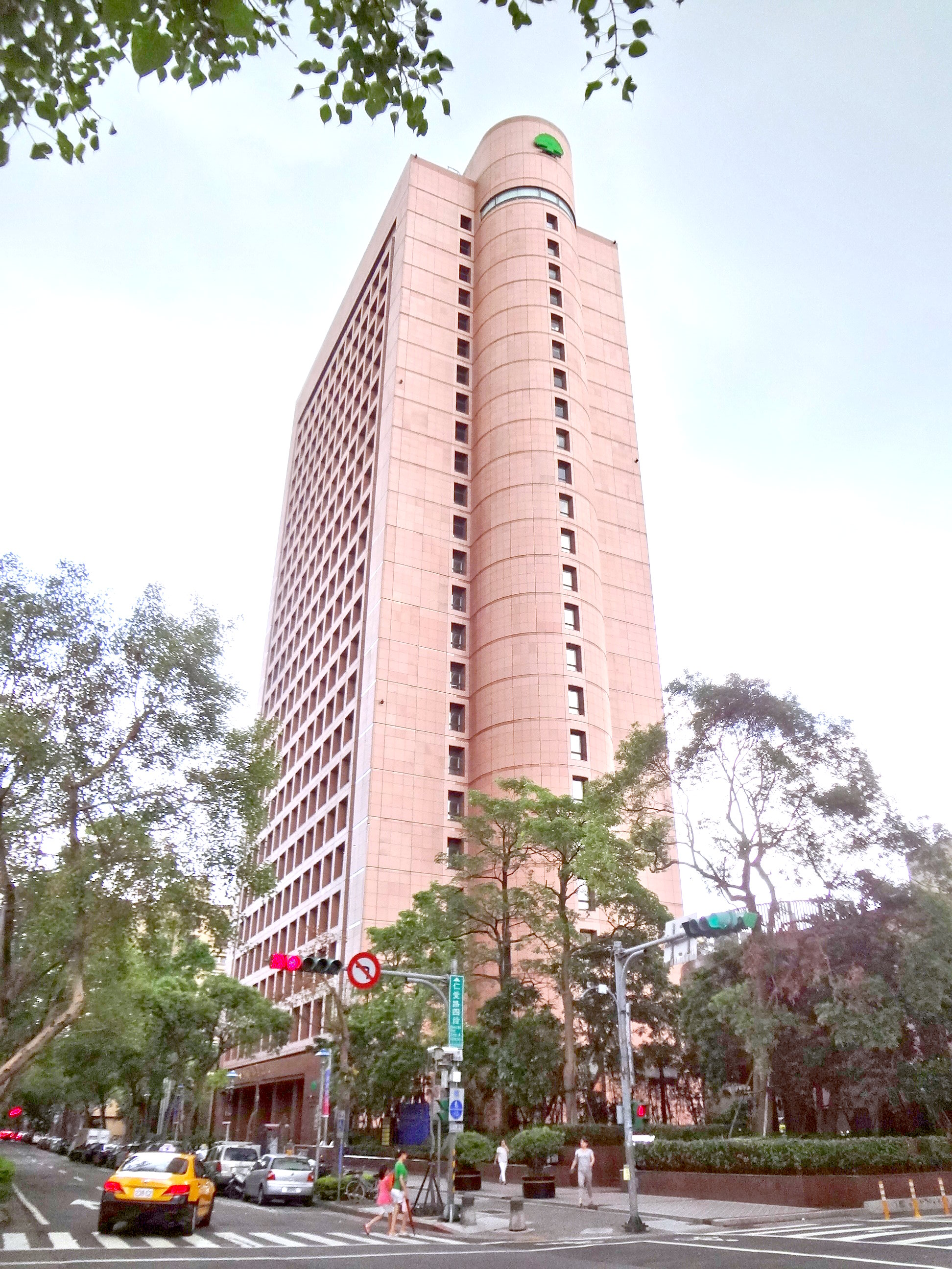 國泰人壽大樓，位於臺灣臺北市大安區仁愛路四段296號。